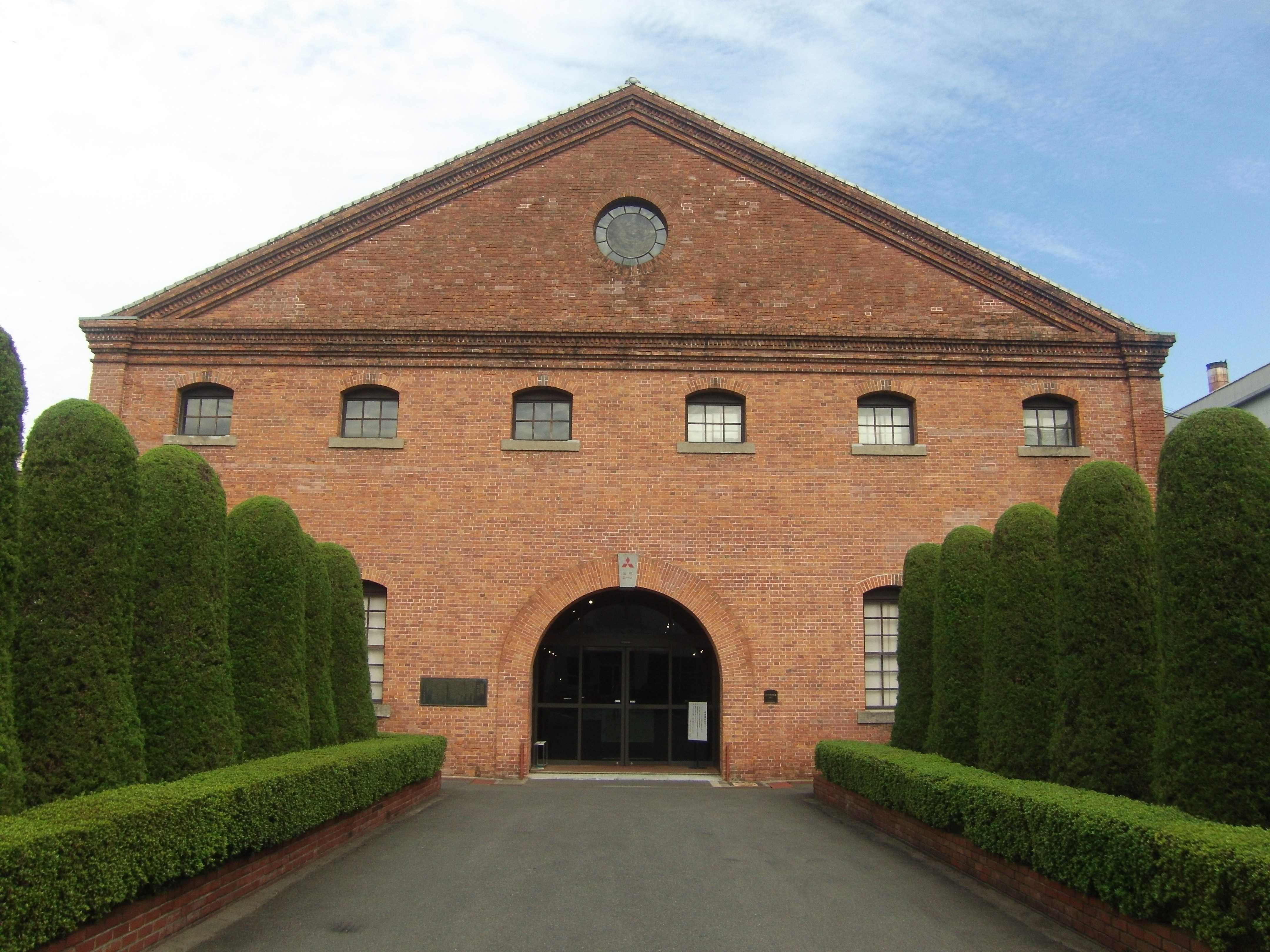 三菱重工業長崎造船所史料館外観